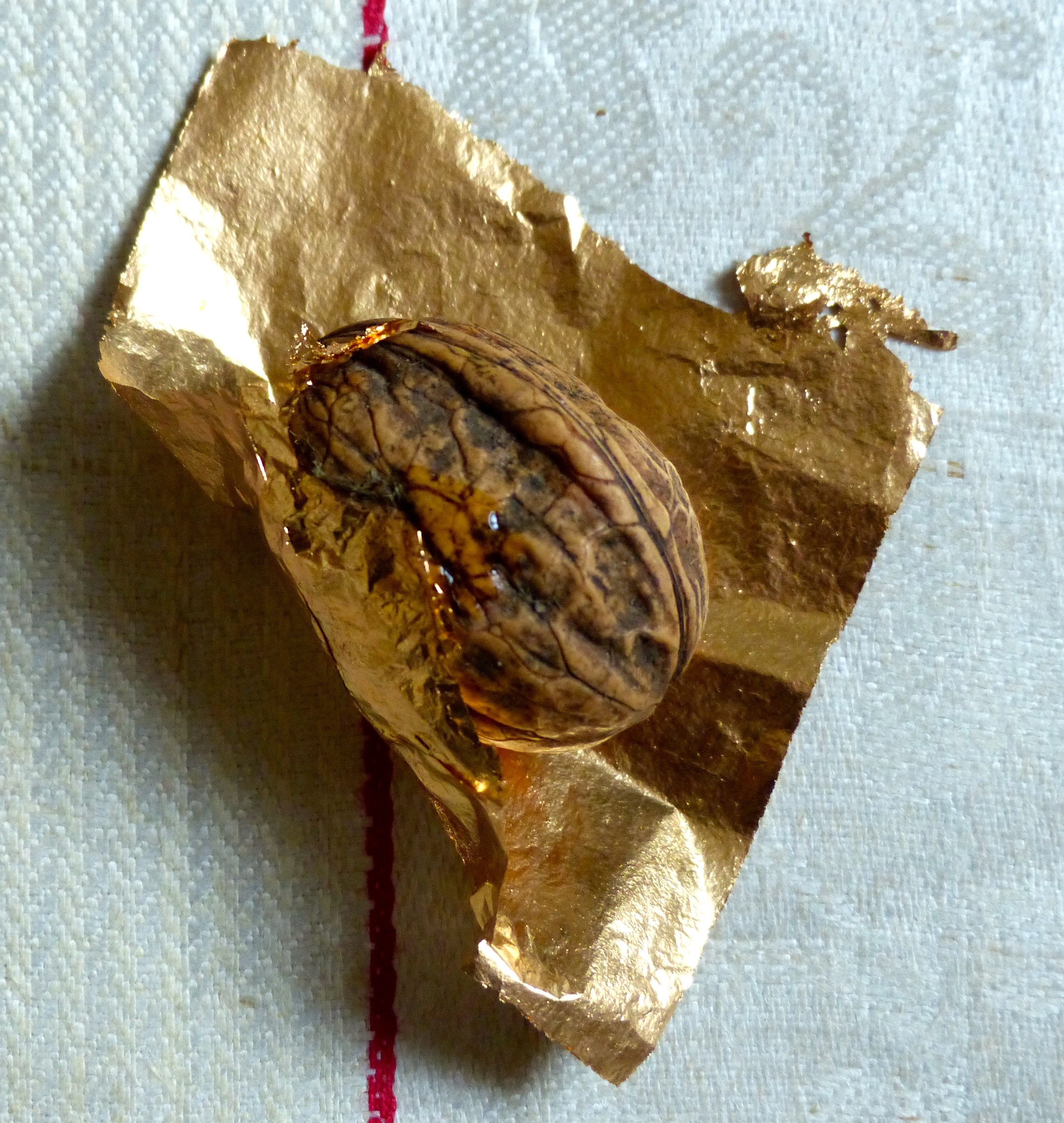 Christbaumgold zum Verzieren von Nüssen für den Weihnachtsbaum, Anfang 20. Jahrhundert